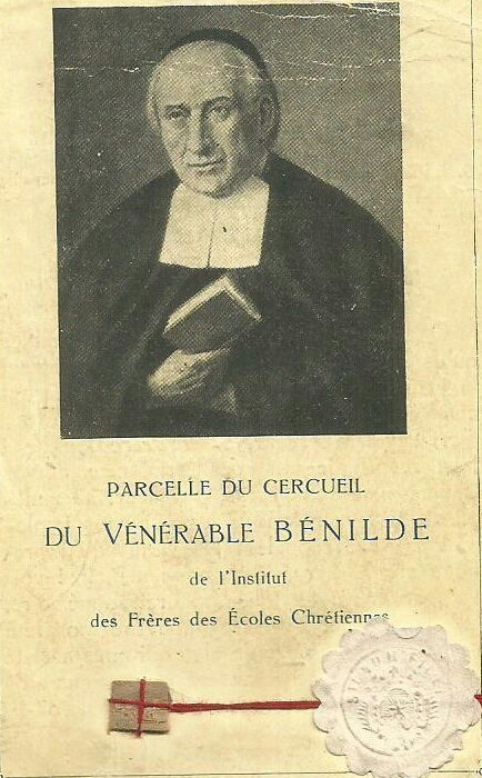 Image pieuse de 1928 de saint Bénilde 1805-1862.